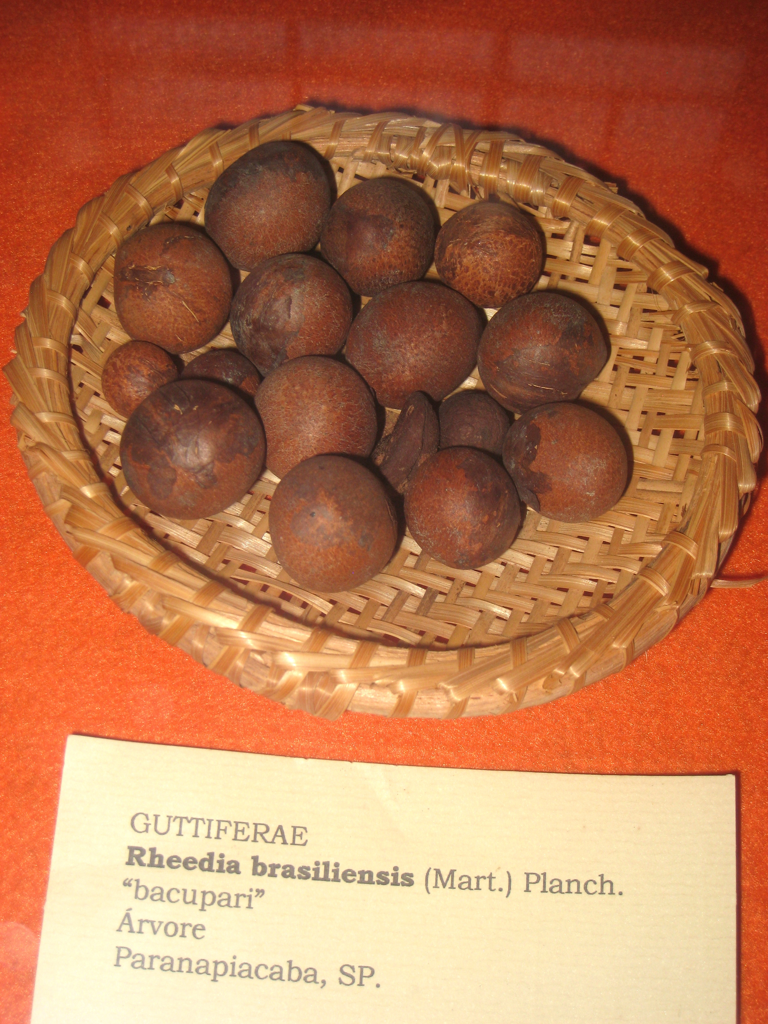 Rheedia brasiliensis specimen in the Museu Botânico Dr. João Barbosa Rodrigues, Jardim Botânico de São Paulo, São Paulo City, SP, Brazil.